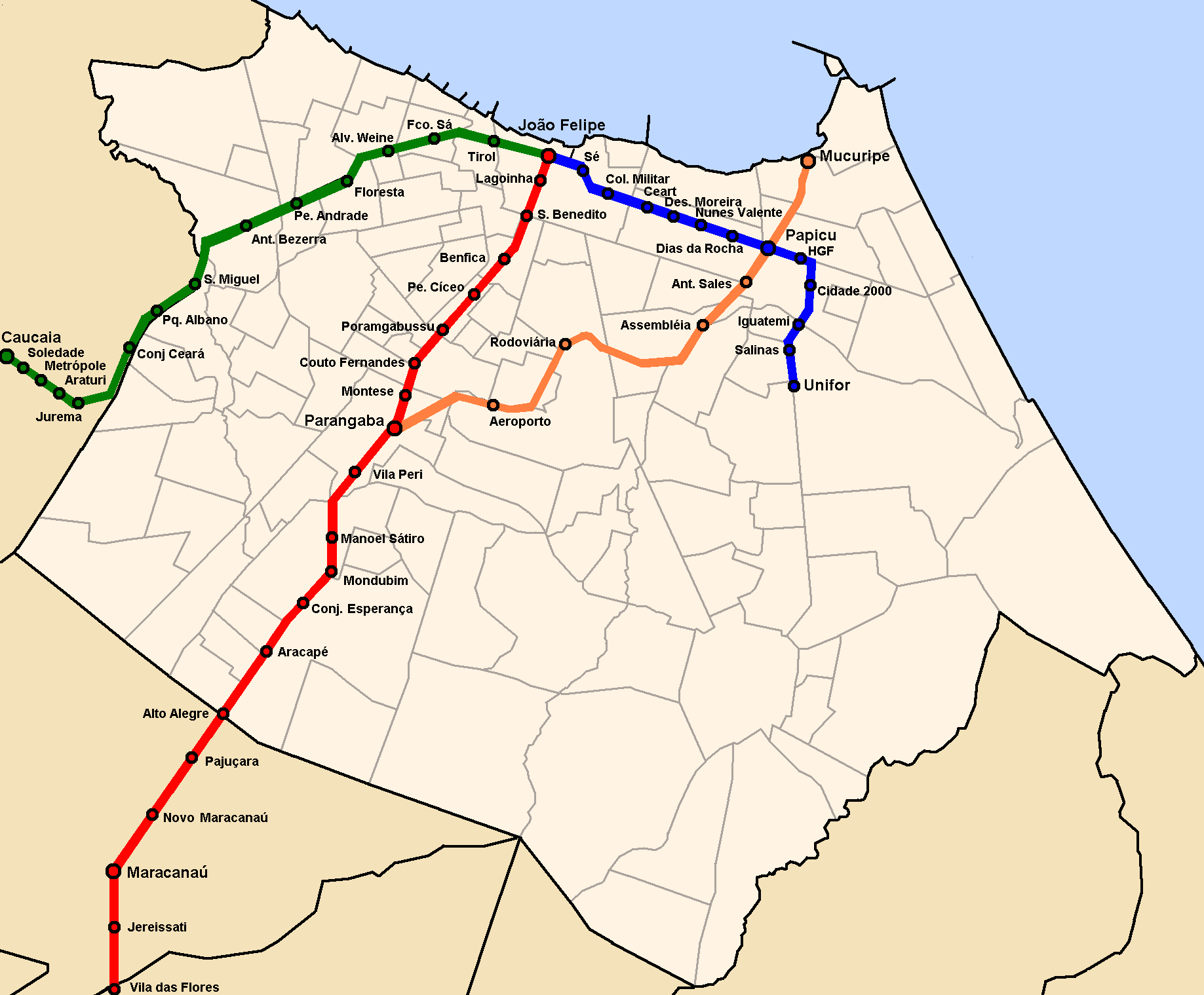 Mapa de Fortaleza com as linhas do Metrofor com a linha leste e Mucuripe